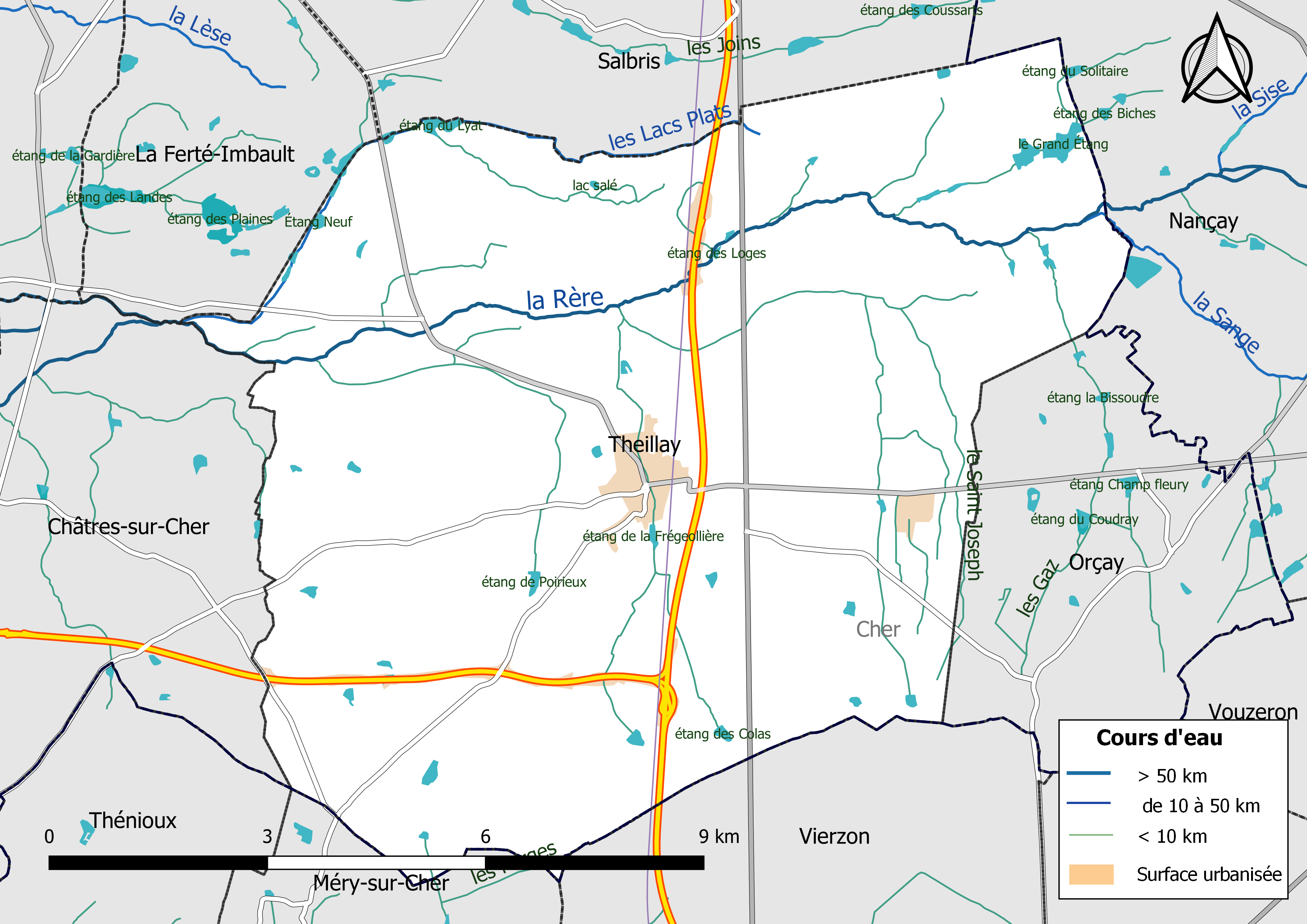 Carte du réseau hydrographique de la commune de Theillay (Loir-et-Cher, France).